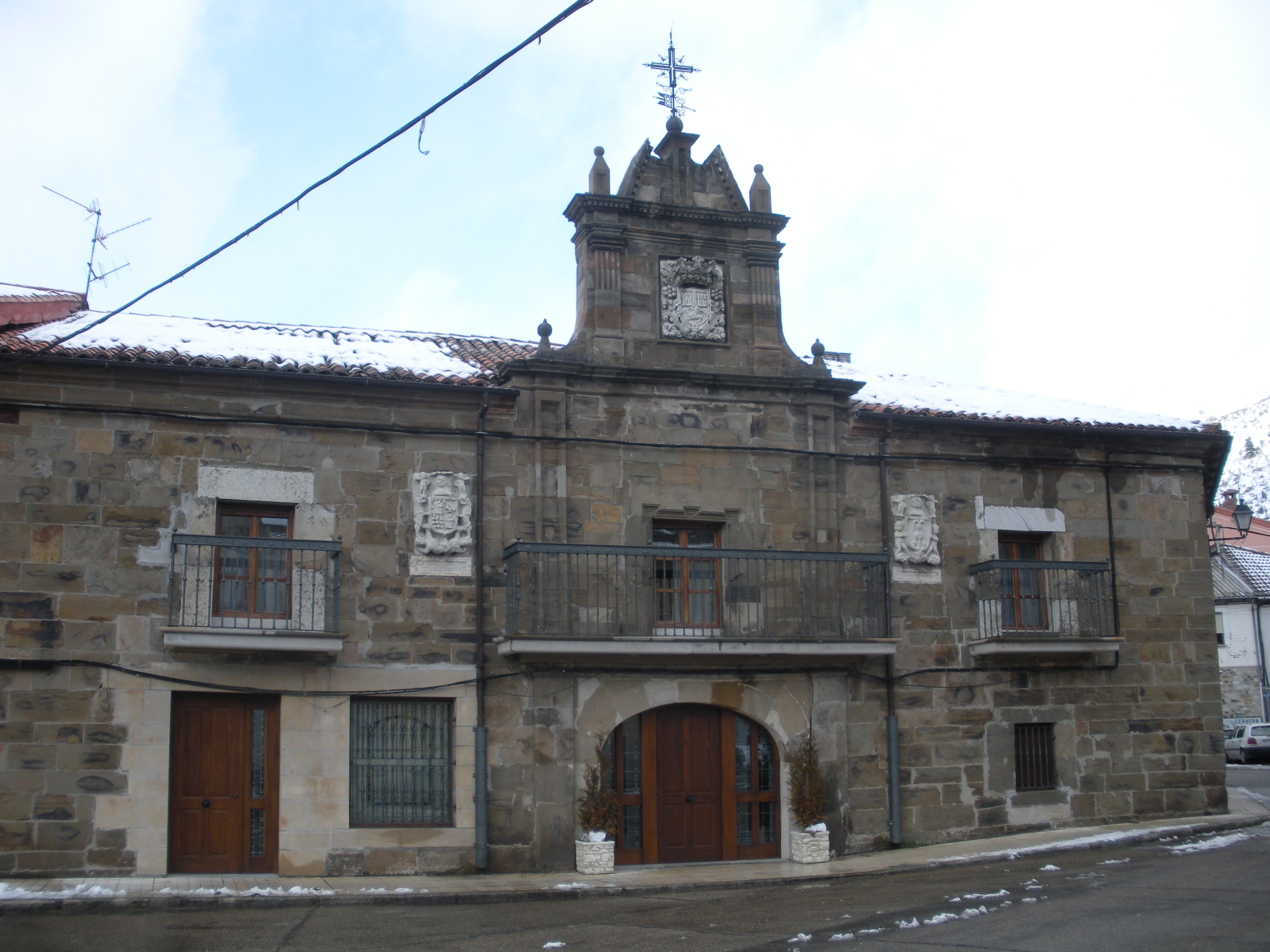 Palacio de los Enríquez, situado en la Plaza Mayor de Velilla del Río Carrión (Palencia), España.